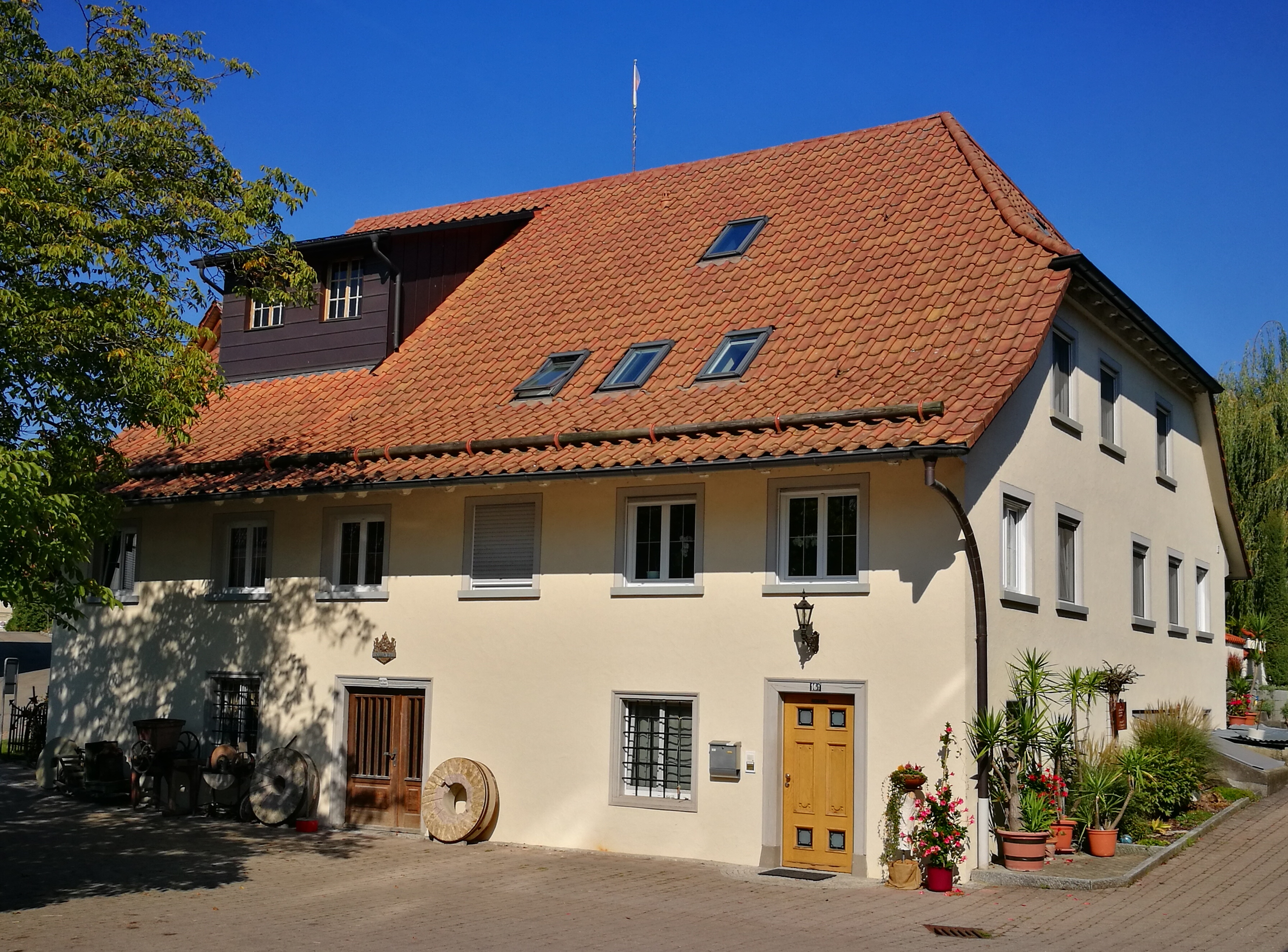 Deutschland (D) - Baden-Württemberg (BW) - Bodenseekreis (FN) - Friedrichshafen - Stadtteil Fischbach: Mühle Dehm / Station 5.28 des Geschichtspfads Friedrichshafen